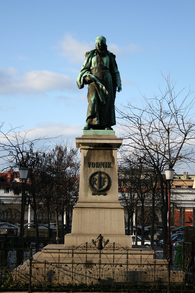 tržnica Ljubljana